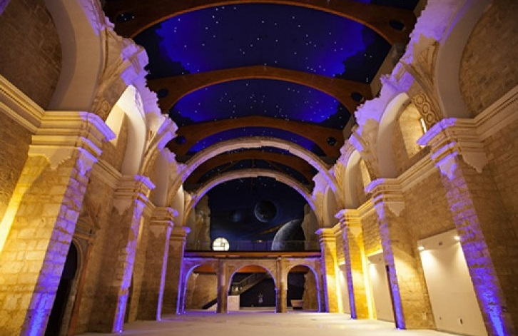 Vista del interior